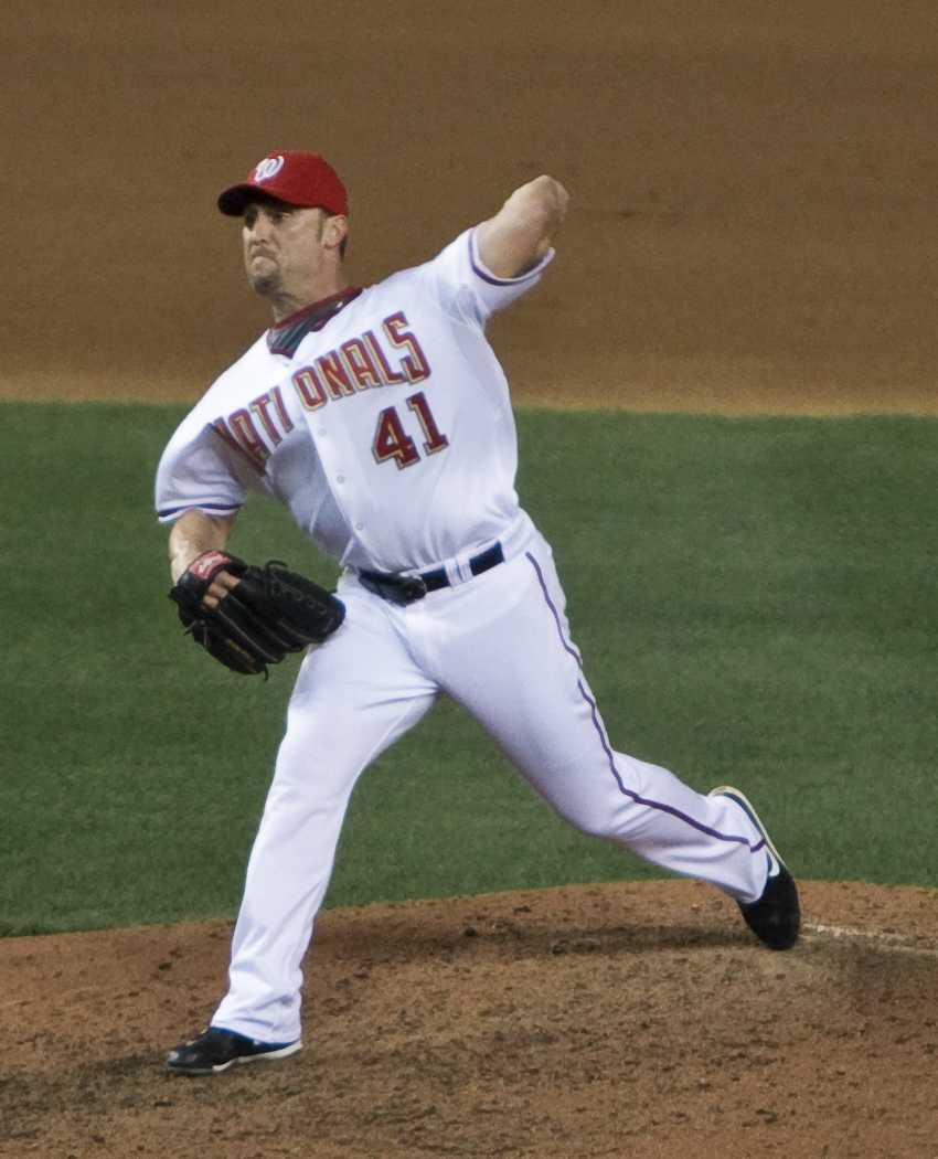 Ron Villone